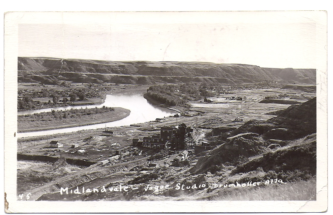 Midland vale -vogue studio-drumheller alberta